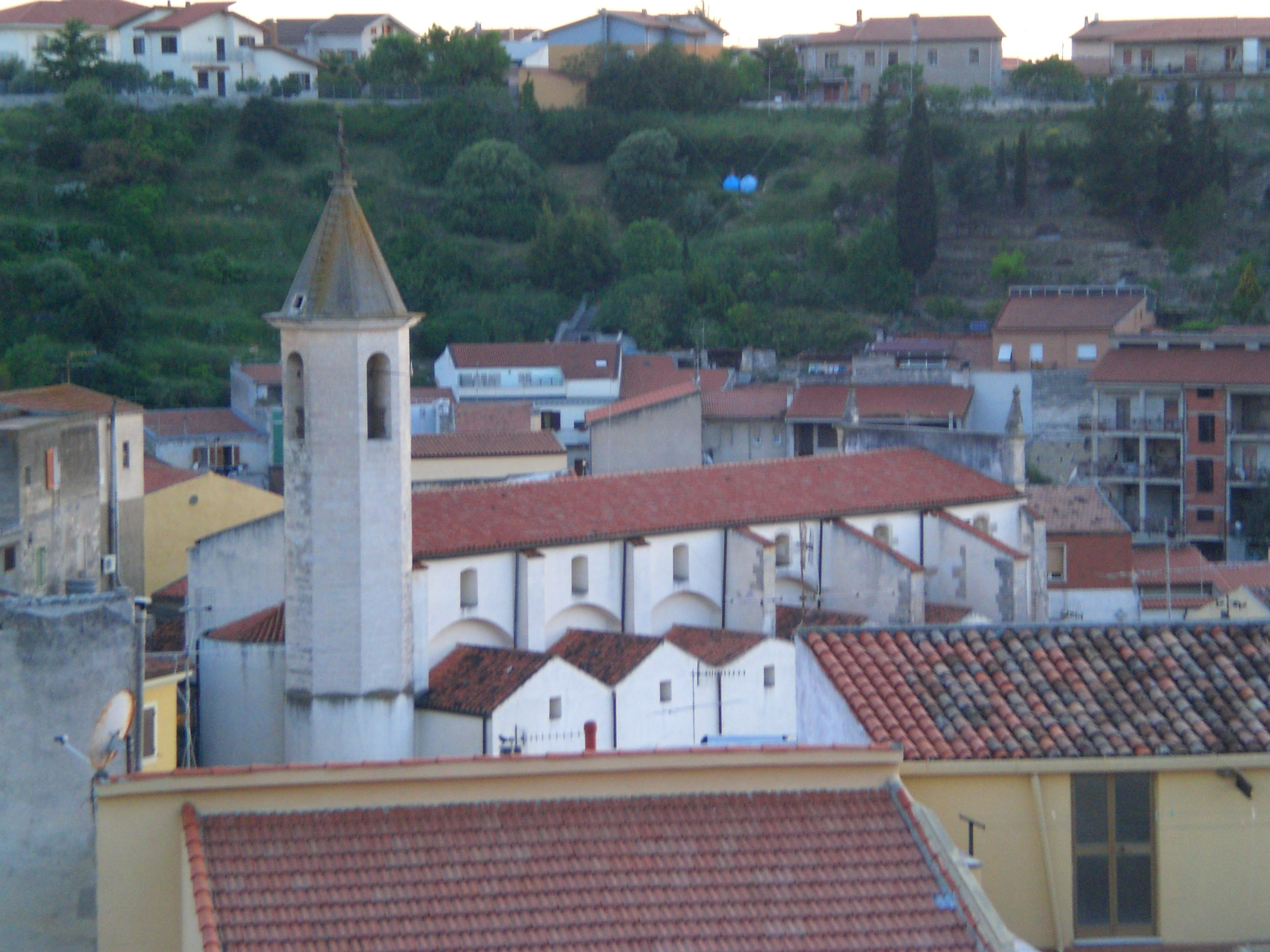 campanile della chisa di san Bartolomeo ad Ossi